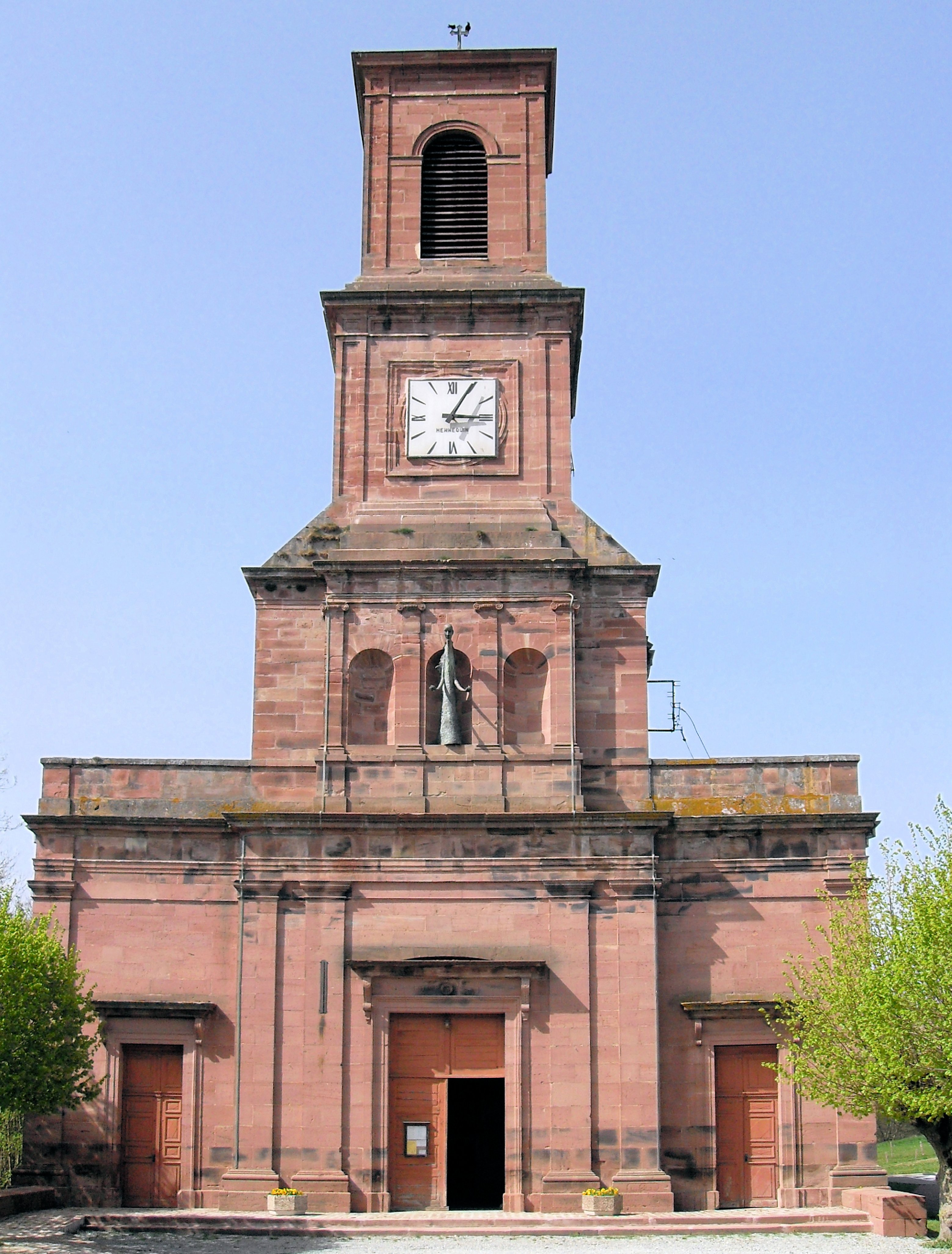 L'église Saint-Vincent à Lachapelle-sous-Rougemont